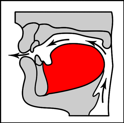 Артикуляция гласного ó (верхнелужицкий язык). Источник: Šewc-Schuster H. Gramatika hornjoserbskeje rěče. — Budyšin: Domowina, 1984. — Т. 1